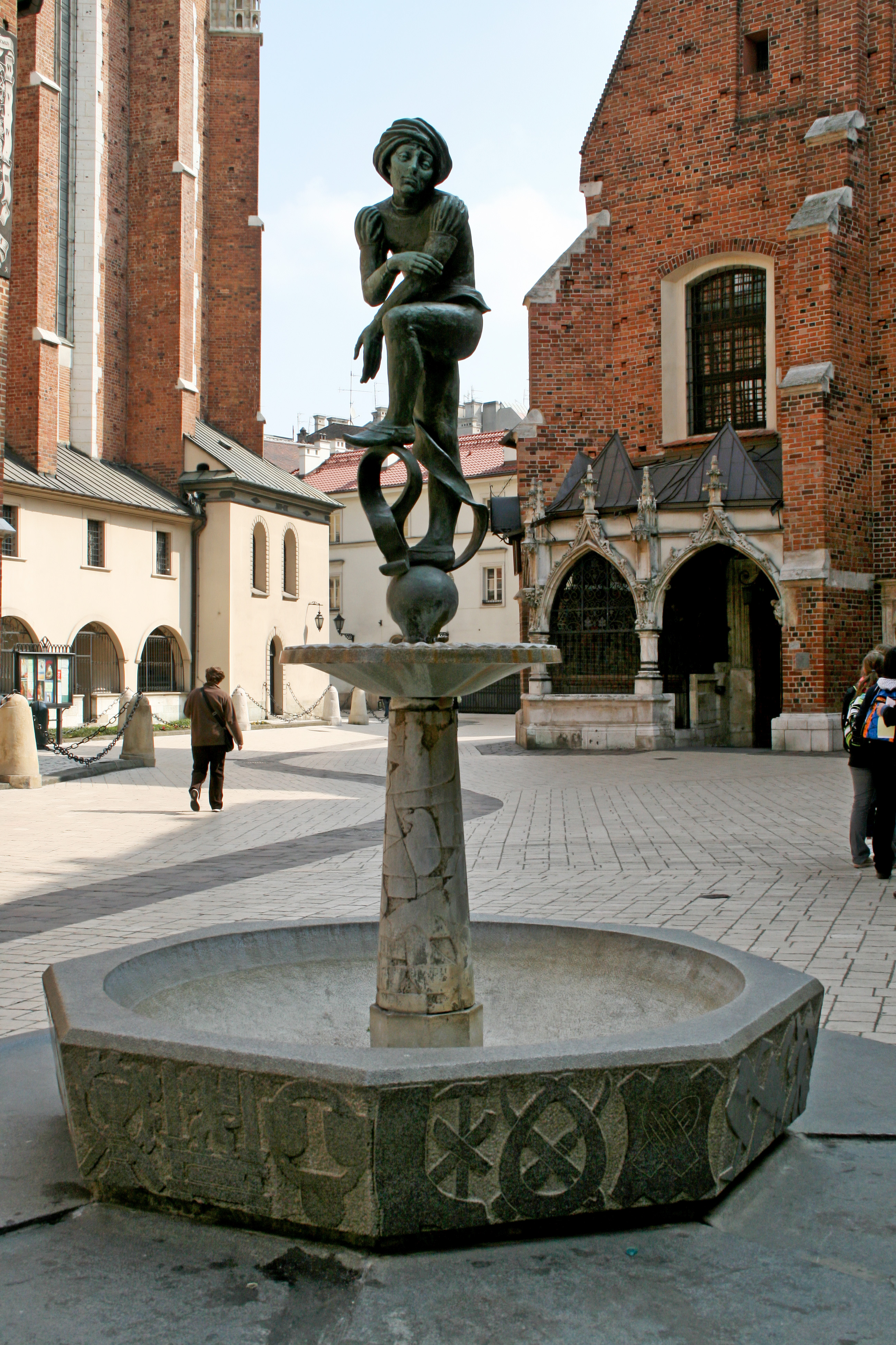 Studzienka na Placu Mariackim w Krakowie (projektował prof. Jan Budziło).